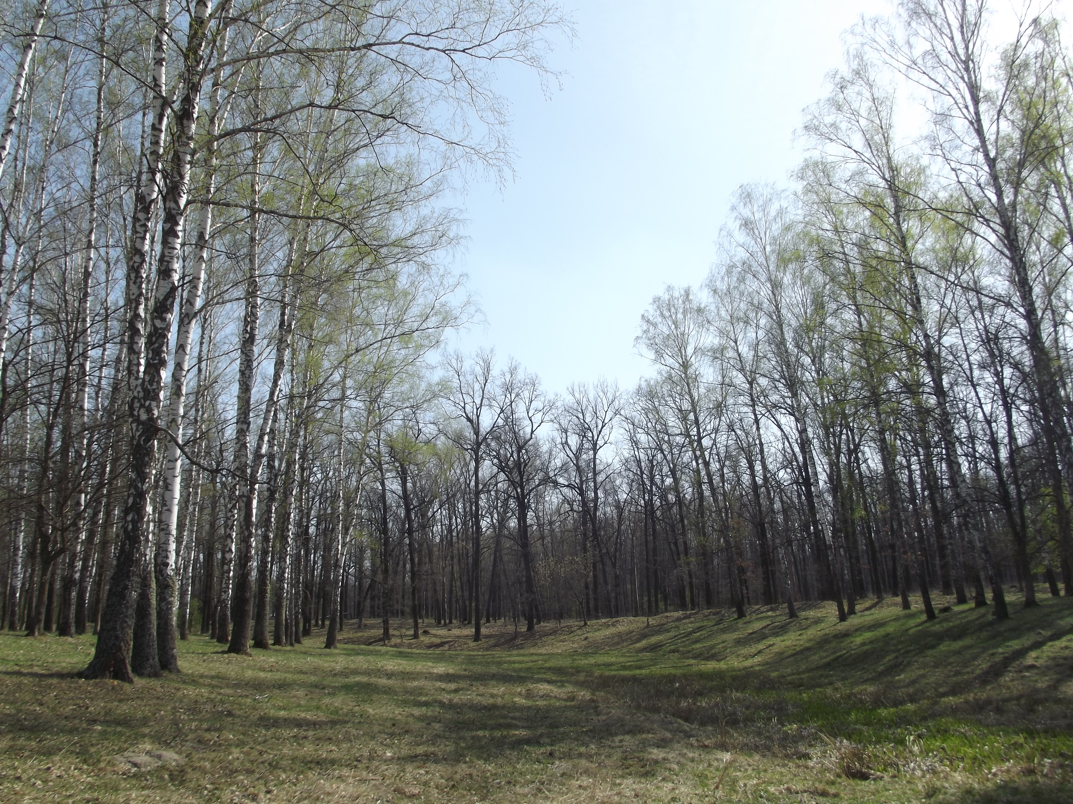 «Воронізький»